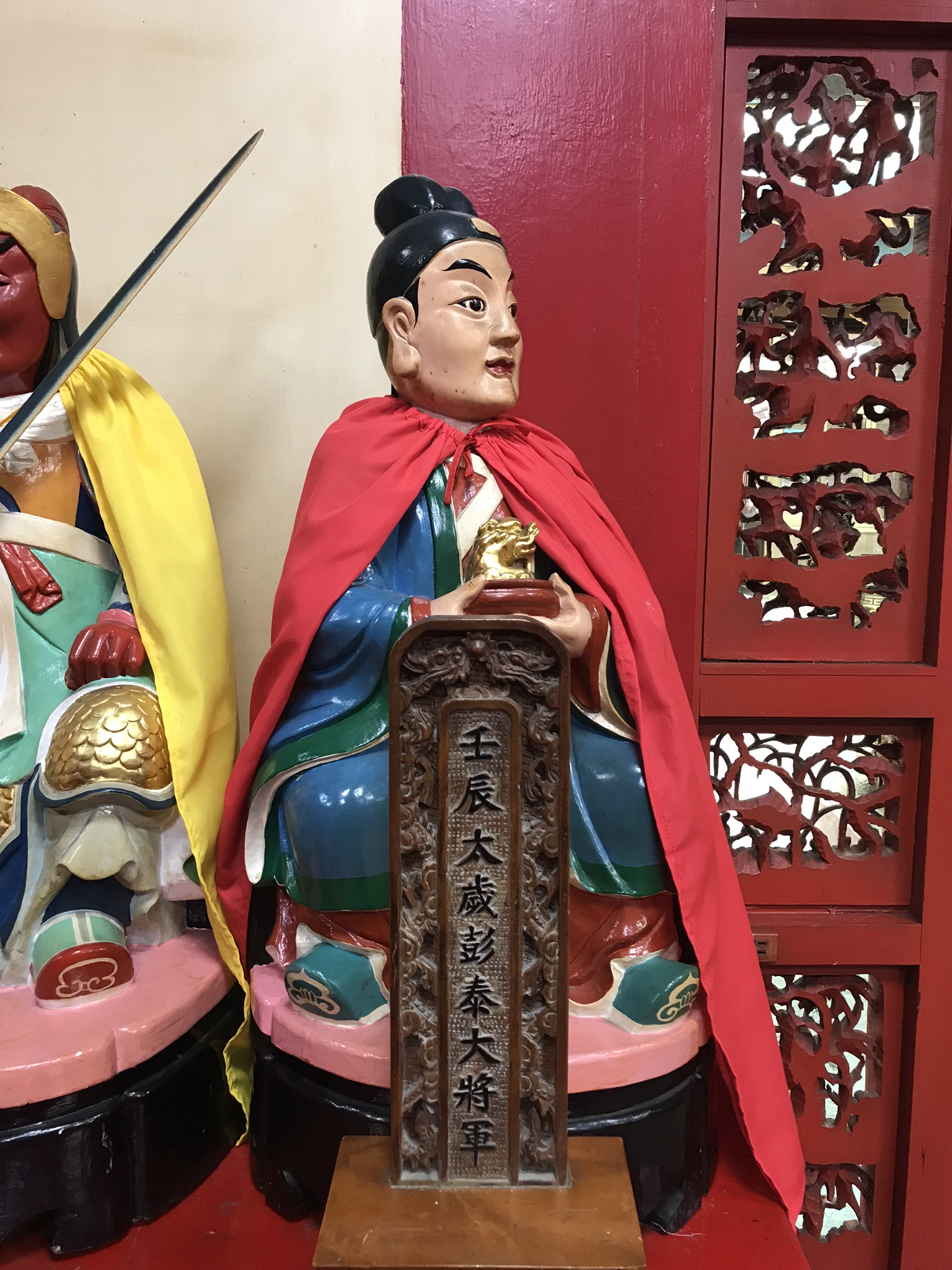 壬辰太歲彭泰大將軍神像